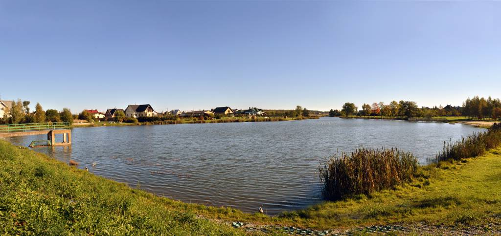 Kretingos parko pirmasis tvenkinys